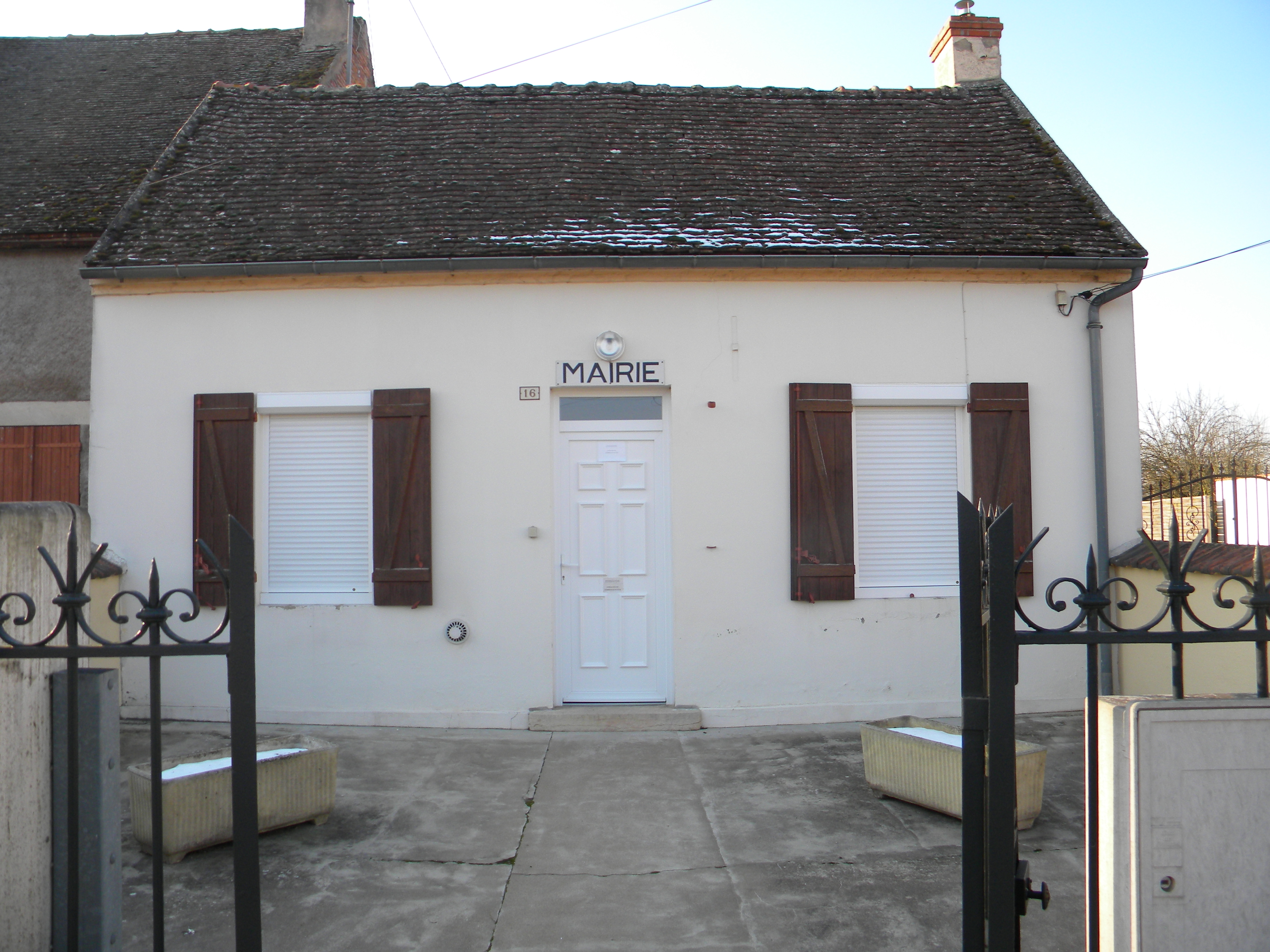 Urbodomo